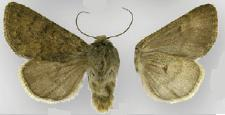 Lasionycta brunnea male